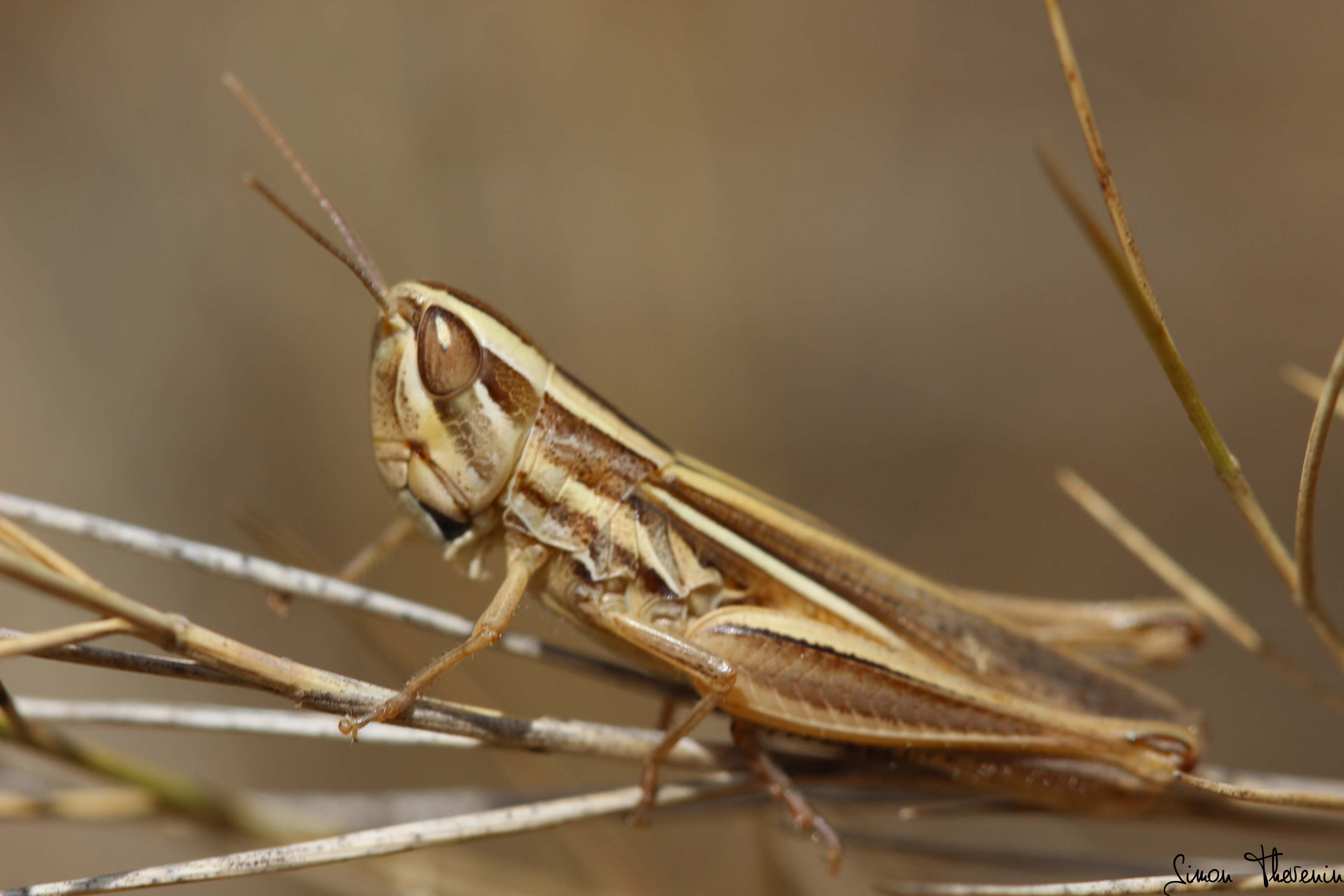 Macrophotographie d'un Criquet du Bragalou (Euchorthippus chopardi) prise à Rognes le 16 Août 2019 par Simon Thevenin